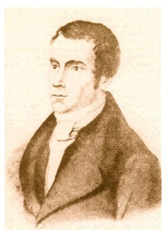 Philippe-Charles Schmerling (1790-1836), Illustration ancienne, domaine public. Origine